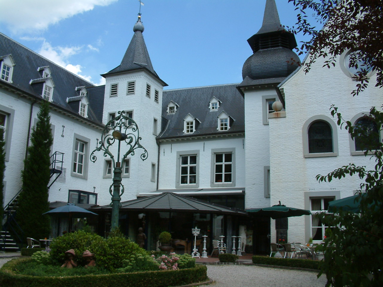 Kasteel Doenrade